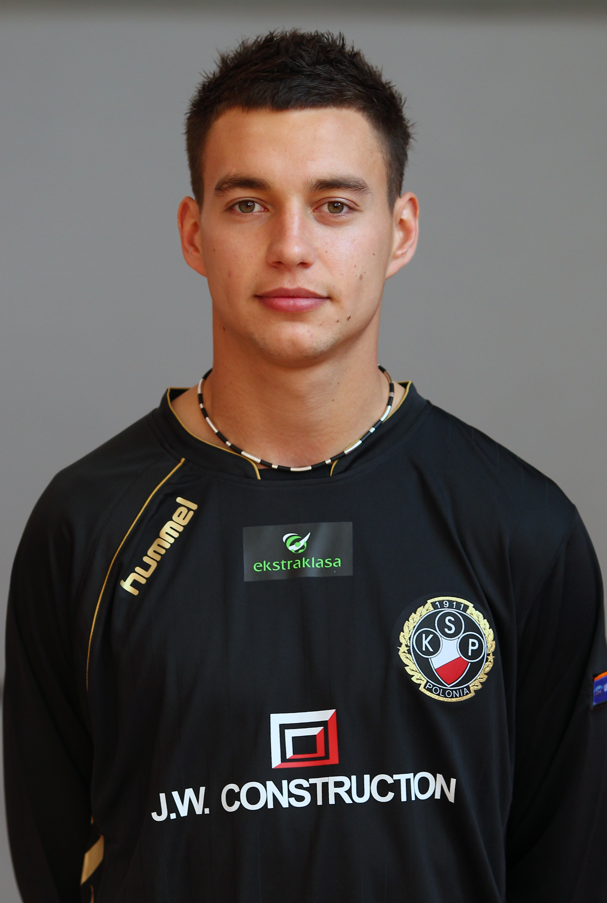 Maciej Sadlok, player of Polonia Warszawa (2011)